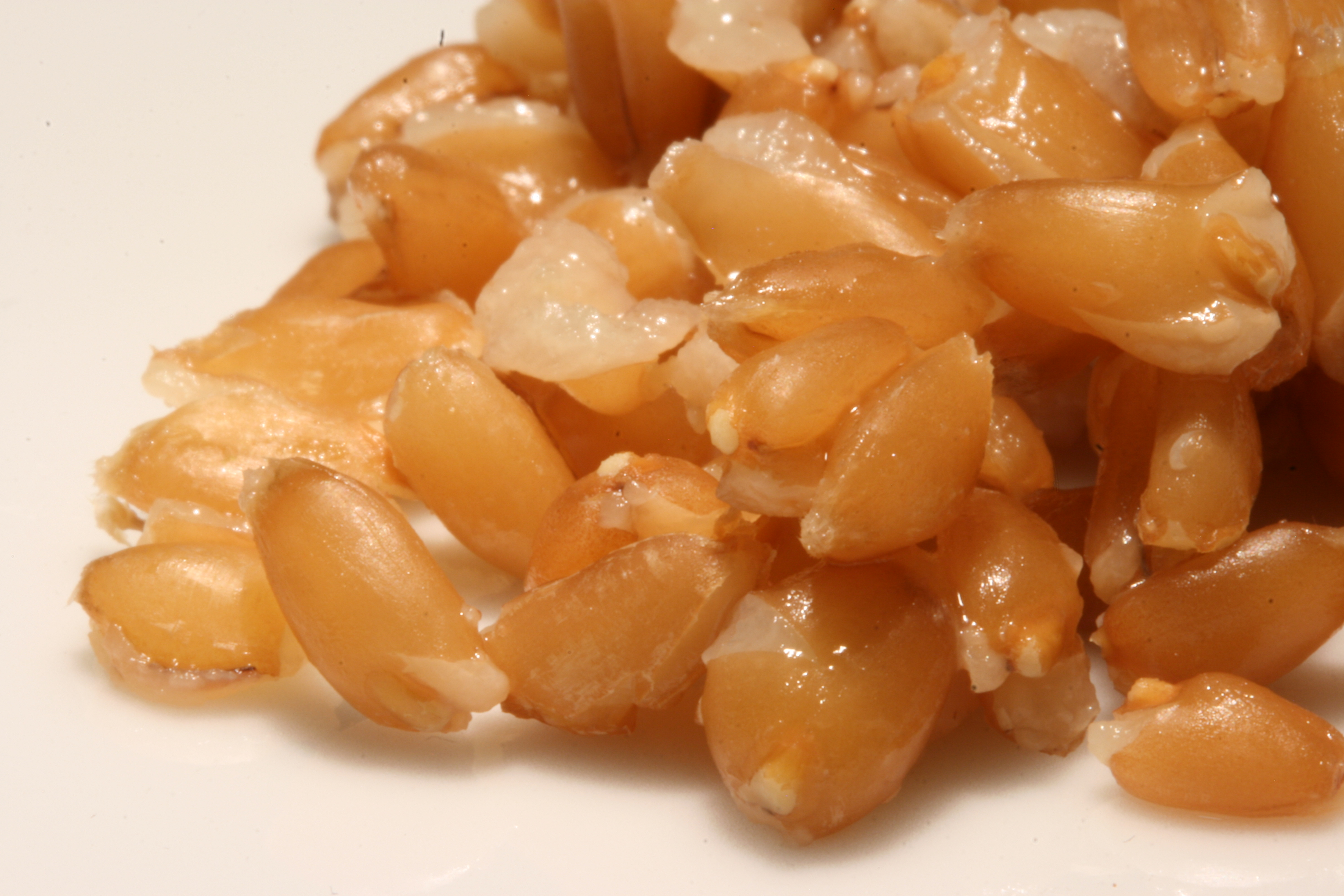 Dinkelreis